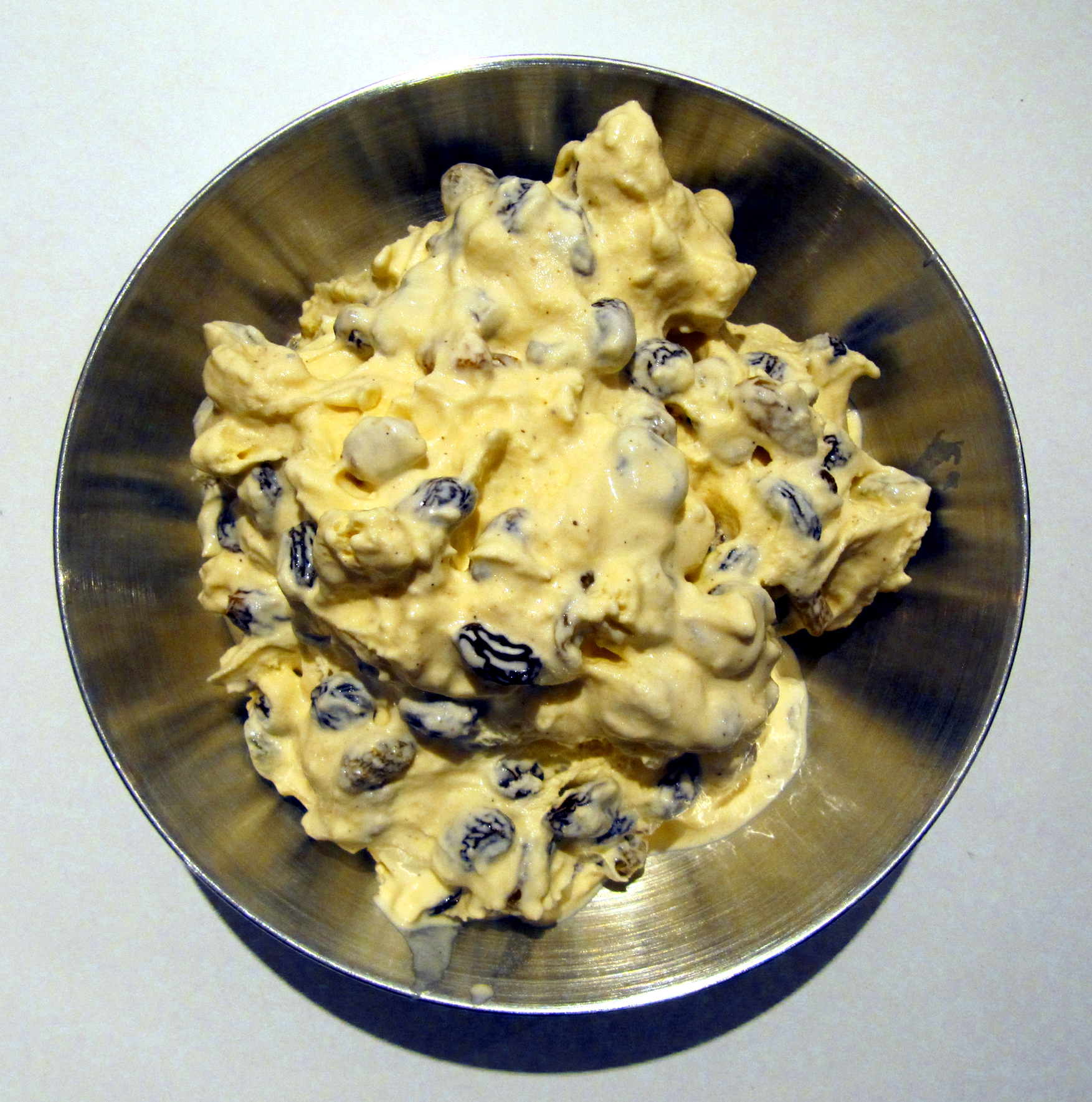 Malaga-Eisklumpen_1